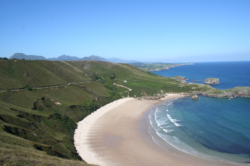 Asturias, Llanes, Playa de Torimbia.